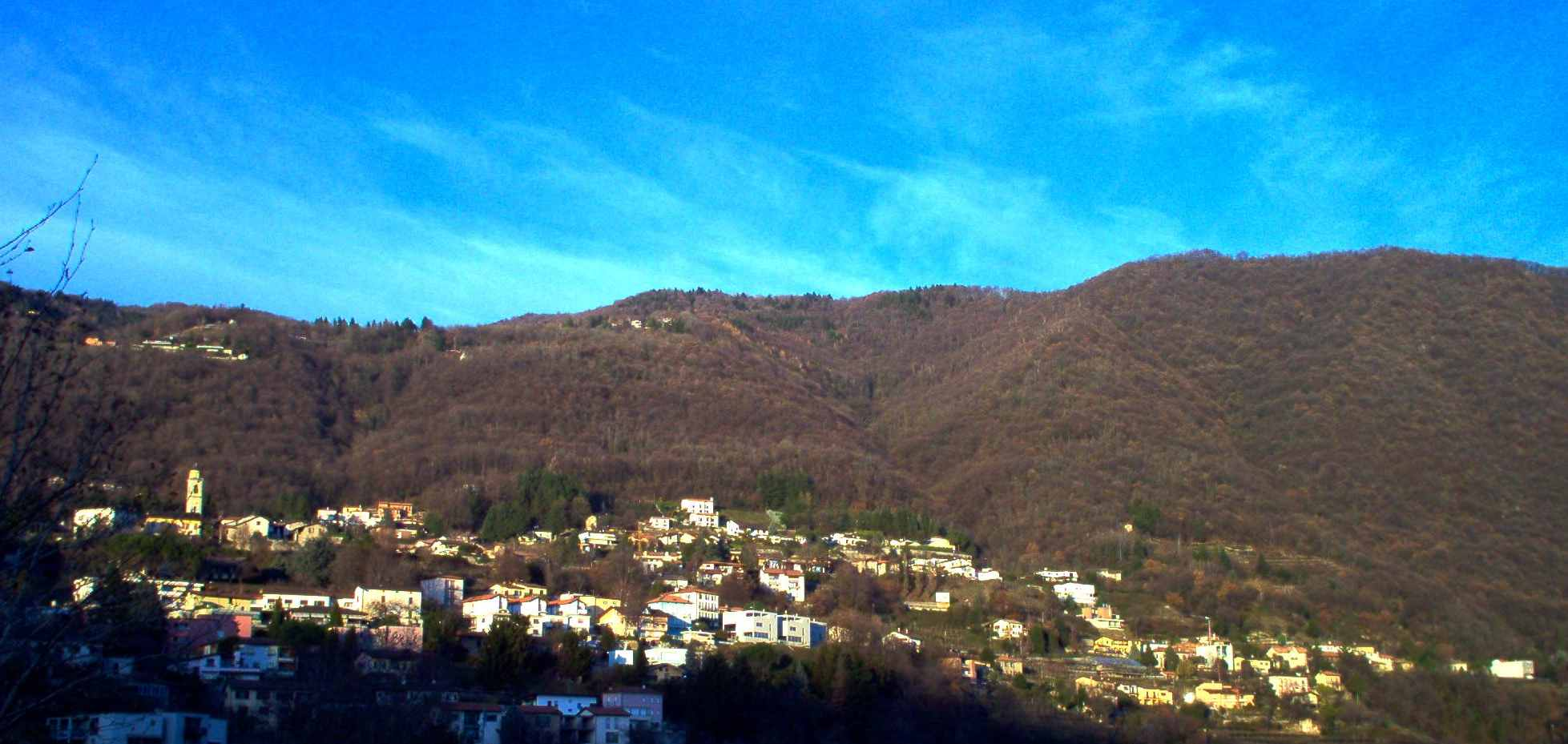 Celso Mosca, Vacallo,panorama